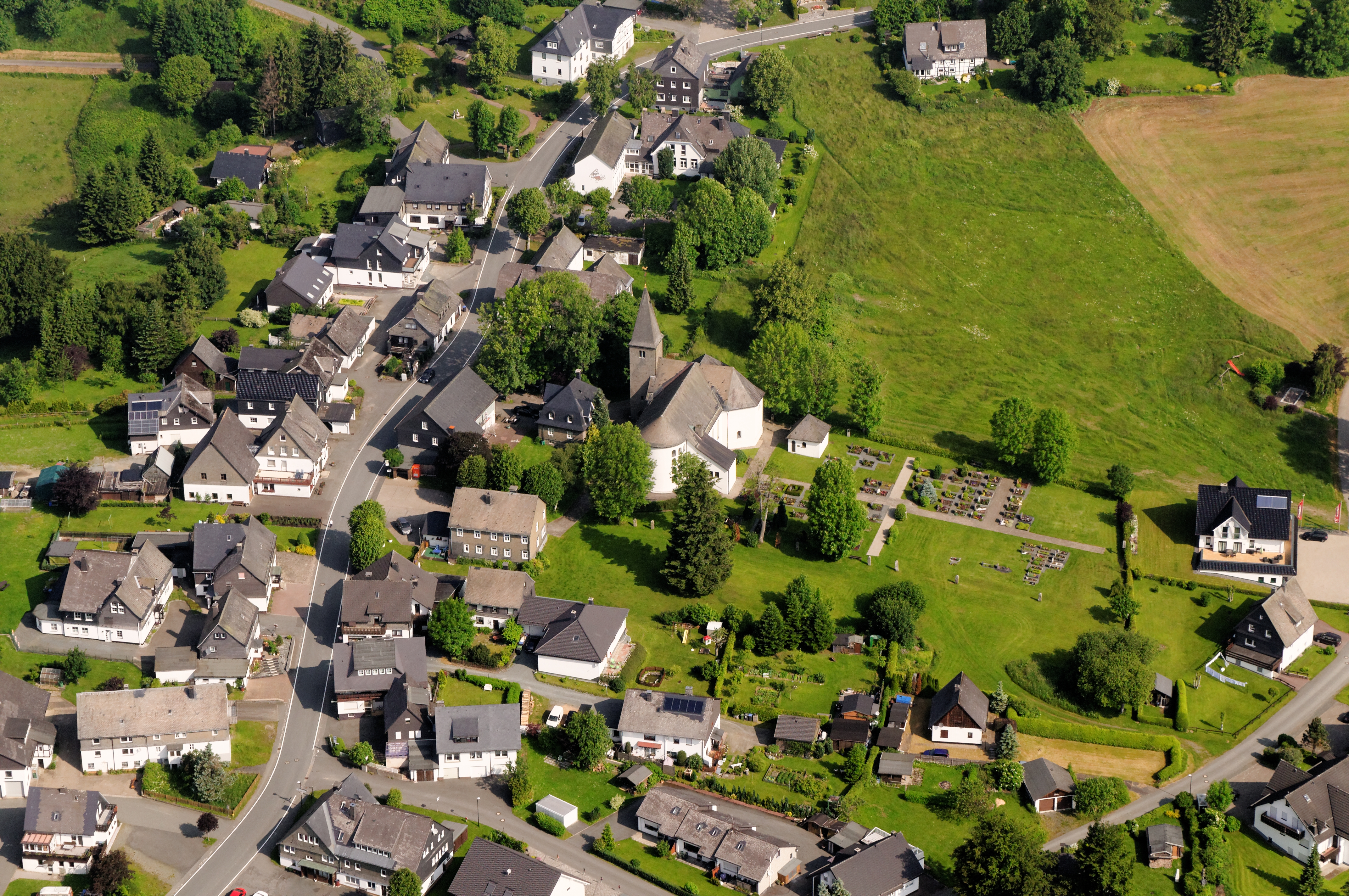 Fotoflug Sauerland-Ost, Winterberg-Neuastenberg, St. Laurentius (Neuastenberg)